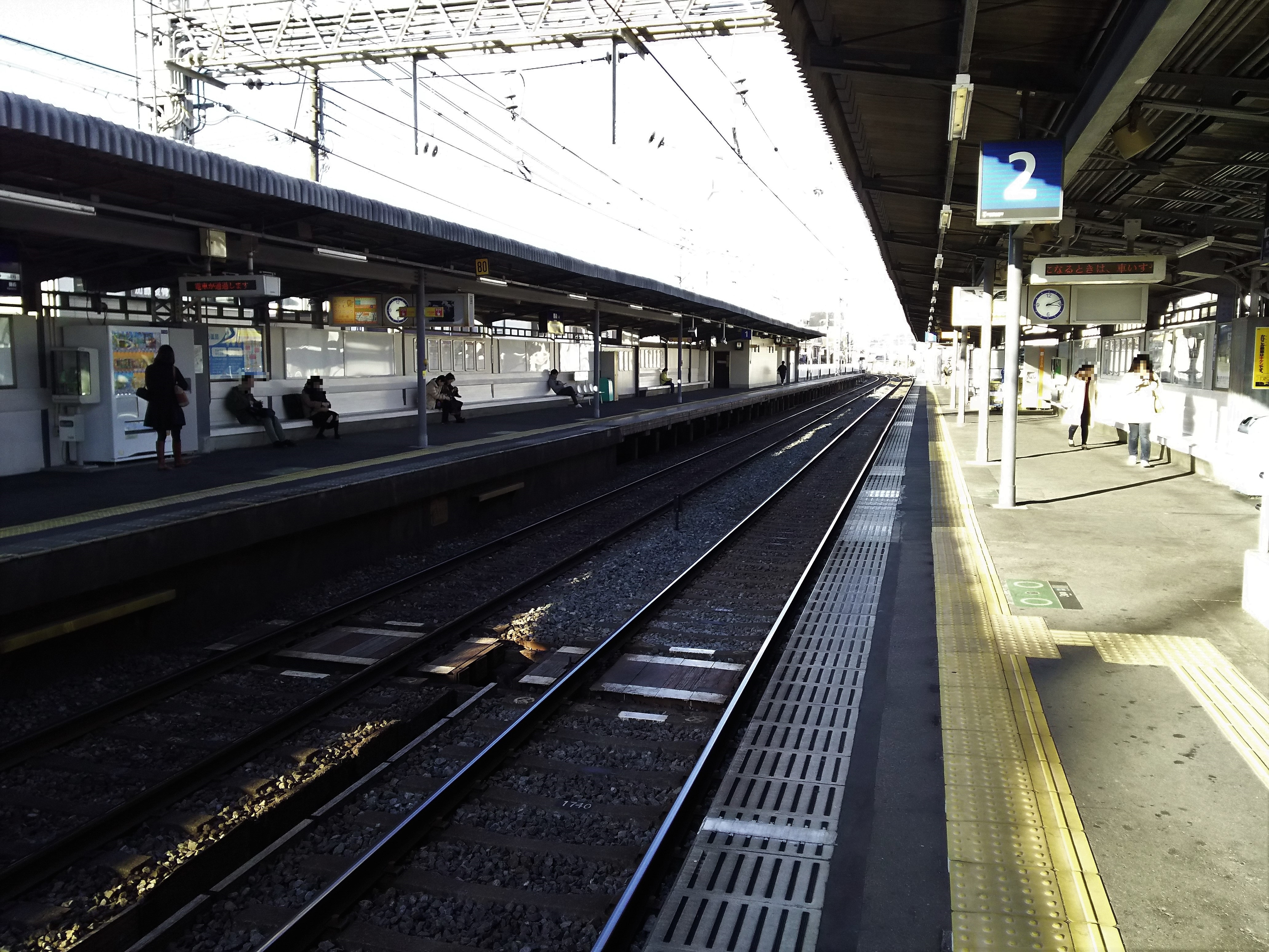 京阪本線墨染駅プラットホーム（京都市伏見区）